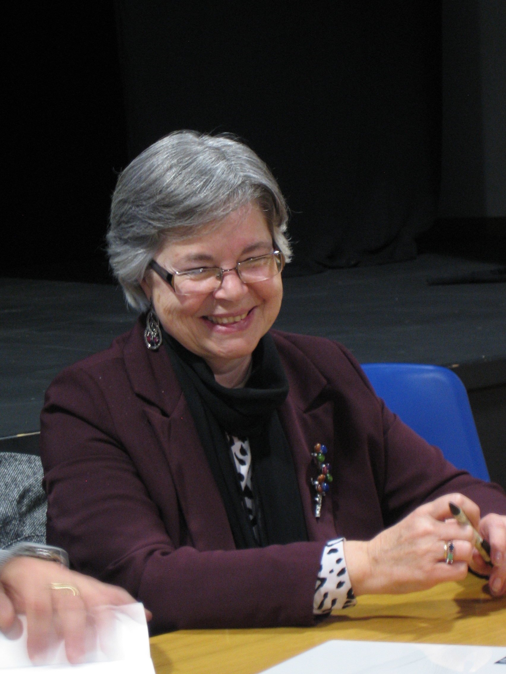 Ana Romero Masiá escritora e historiadora na presentación do seu libro Xaime Quintanilla Martínez. Vida e obra dun socialista e galeguista ao servizo da República, escrito en colaboración con Carlos Pereira Martínez, e presentado no concello de Culleredo o 16 de marzo do 2012.